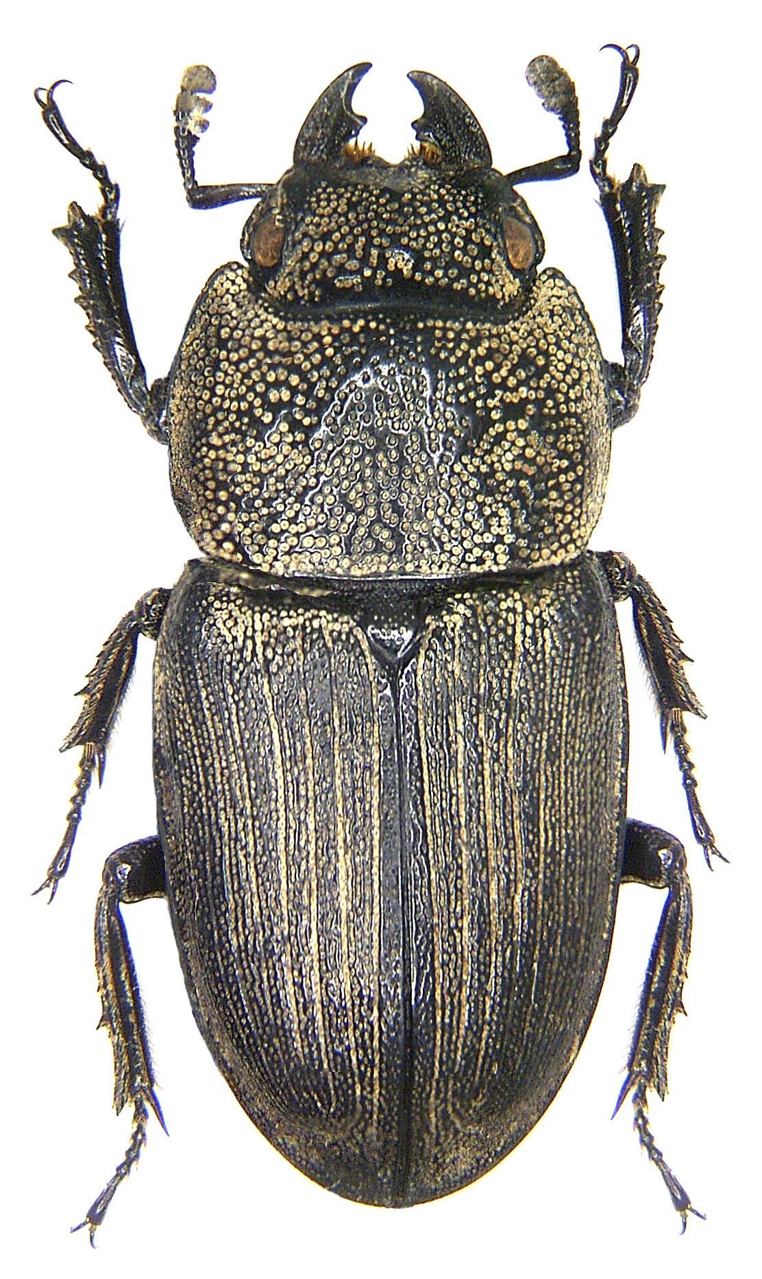 Familie: Lucanidae Grösse: 15-39,5 mm Verbreitung: Südost-Asien, Thailand, Laos, Nordvietnam Fundort: Nordvietnam, Yen Bai Prov., An Fu Country det. U.Schmidt Foto: U.Schmidt, 2007